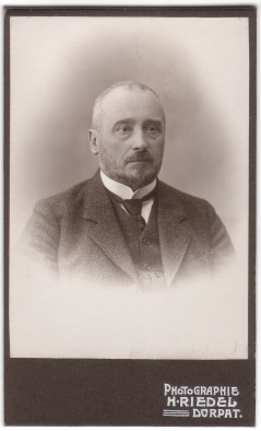 Aleksandr Ivanovitš Sadovski